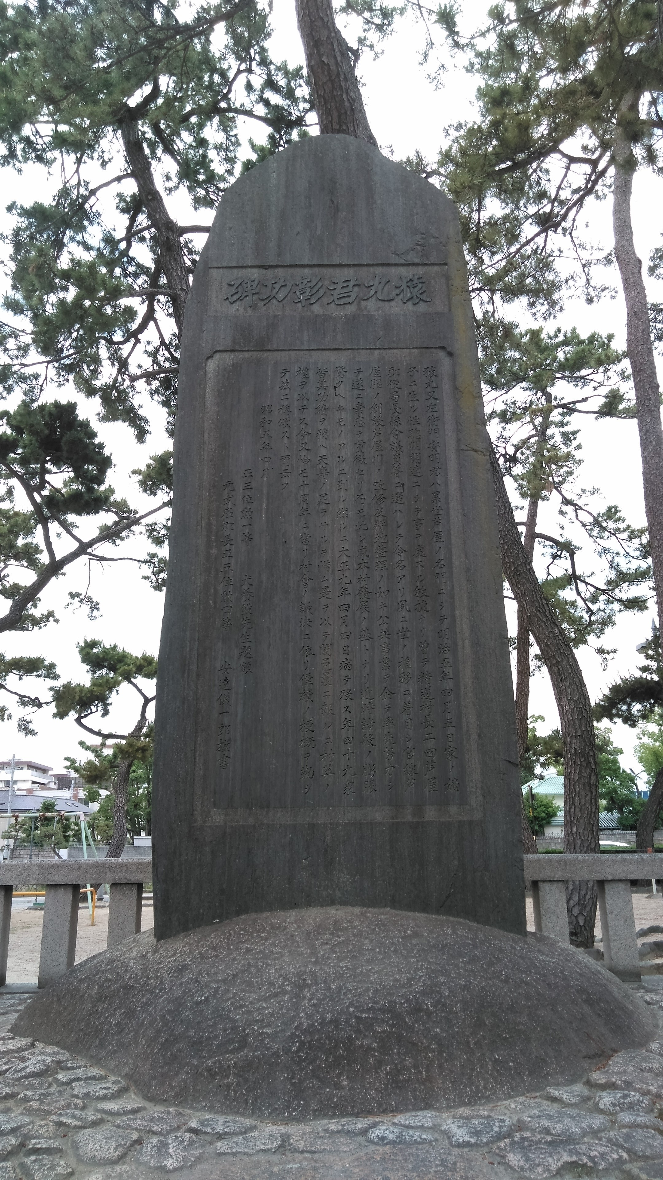 猿丸君彰功碑